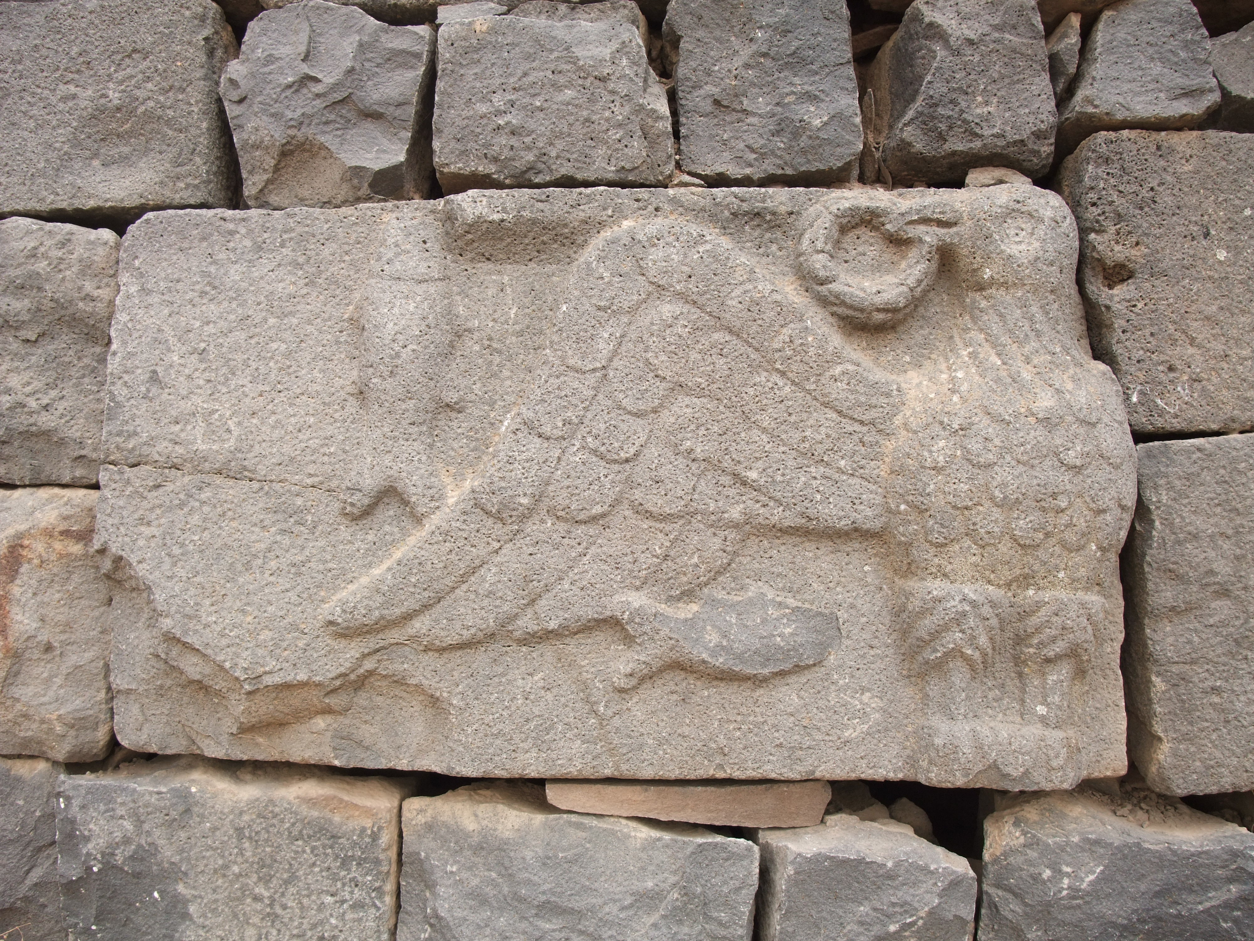 אבן משקוף בכפר דבורה